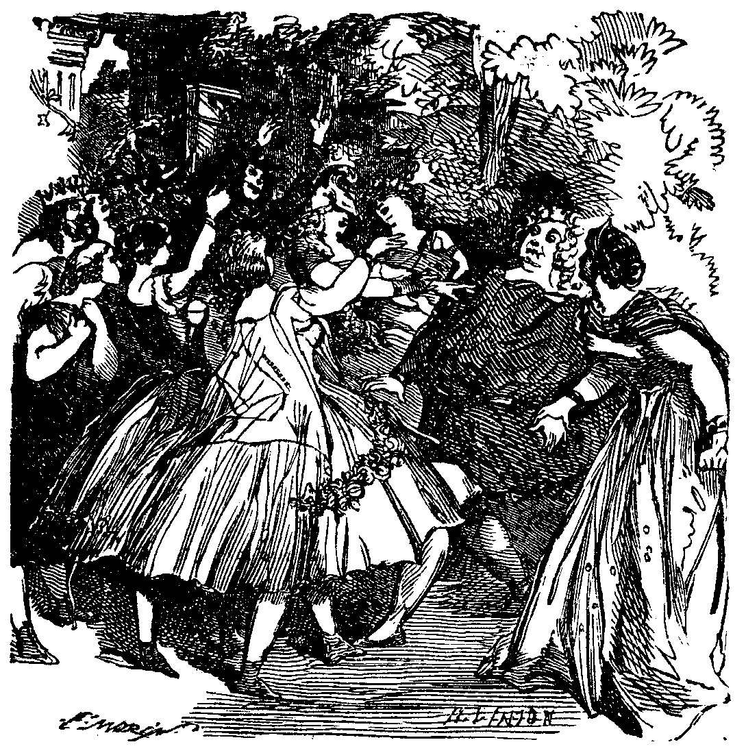 L'Olympe - Orphée aux Enfers (1858)